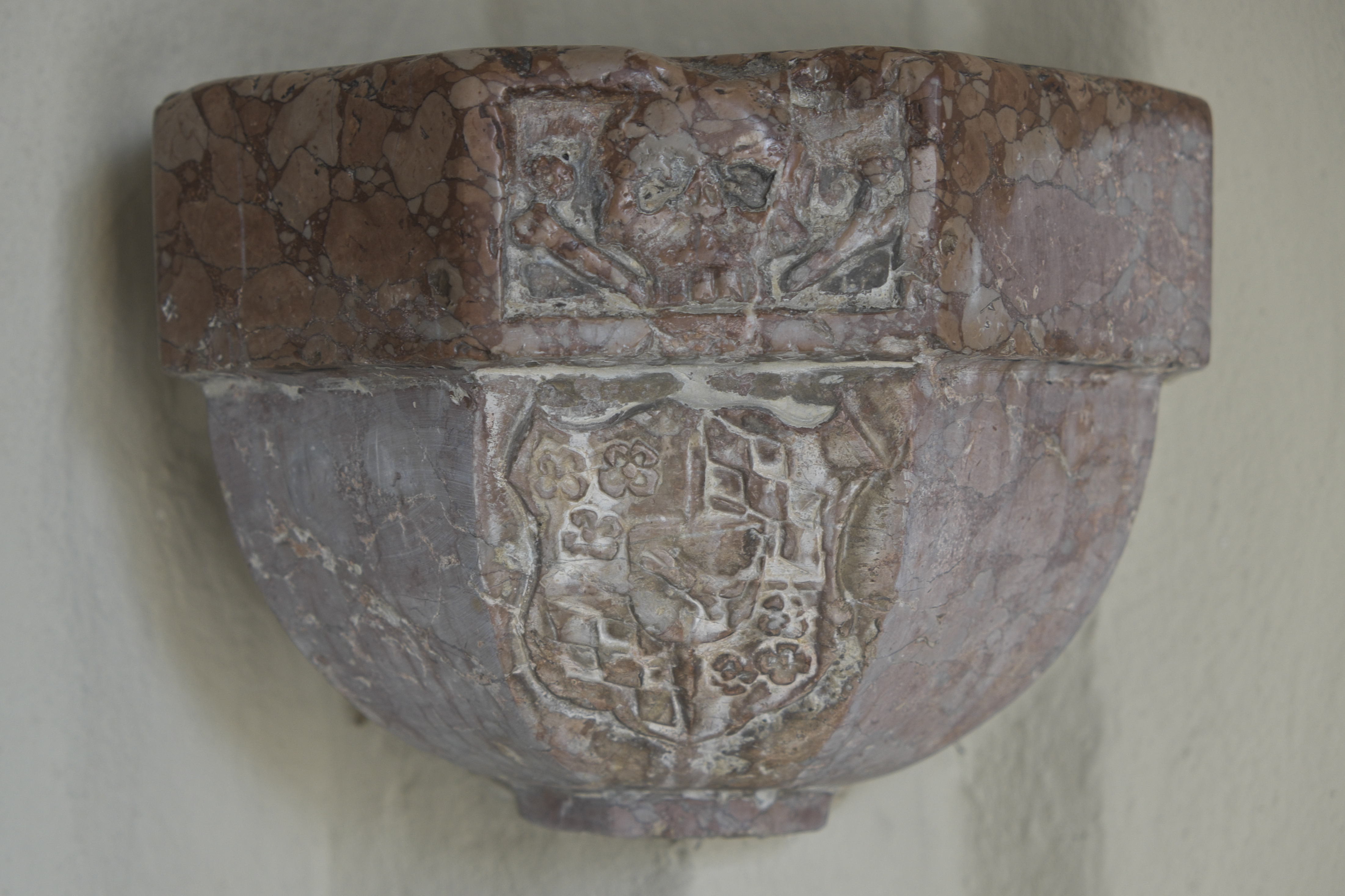 Katholische Pfarrkirche St. Peter und Paul in Oberalting, einem Ortsteil von Seefeld (Bayern/Deutschland), Weihwasserbecken